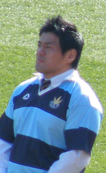 第50回全国大学ラグビーフットボール選手権大会の記念セレモニーに登場した山村亮氏